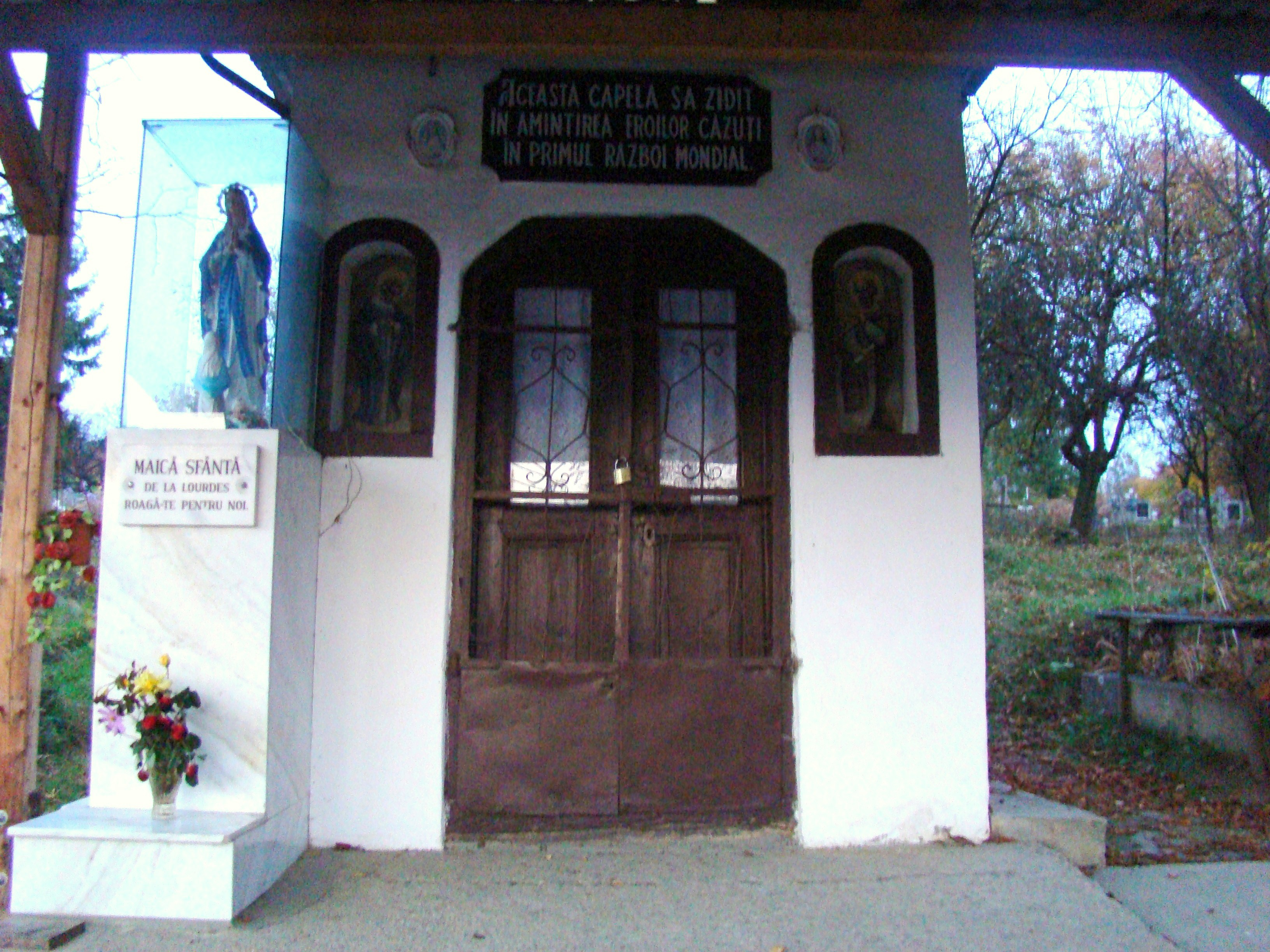 Capela Eroilor căzuți în Primul Război Mondial, Șișești, județul Maramureș